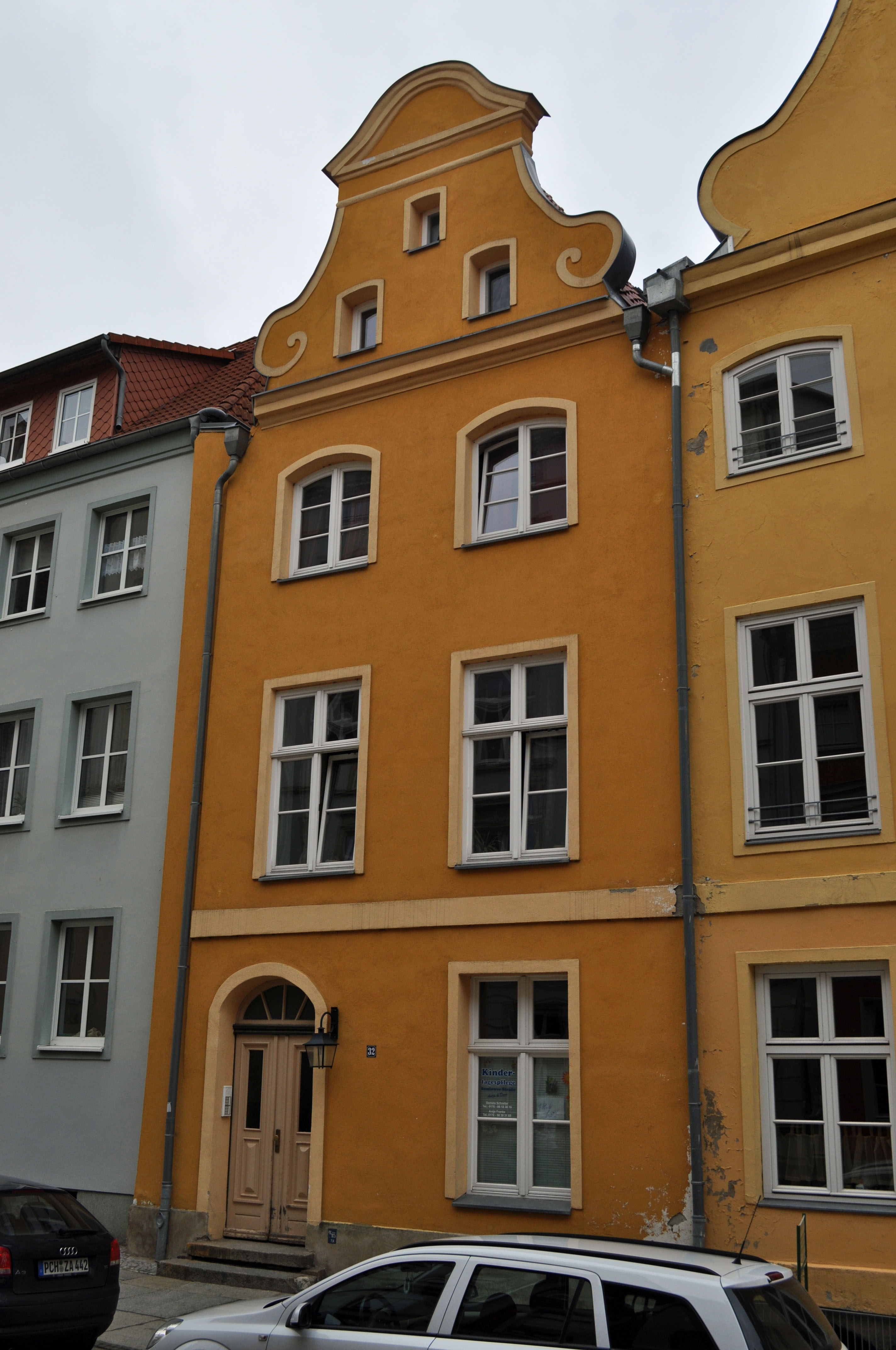 Gebäude bzw. Gebäudedetail in Stralsund. Straße und Hausnummer siehe Dateiname.